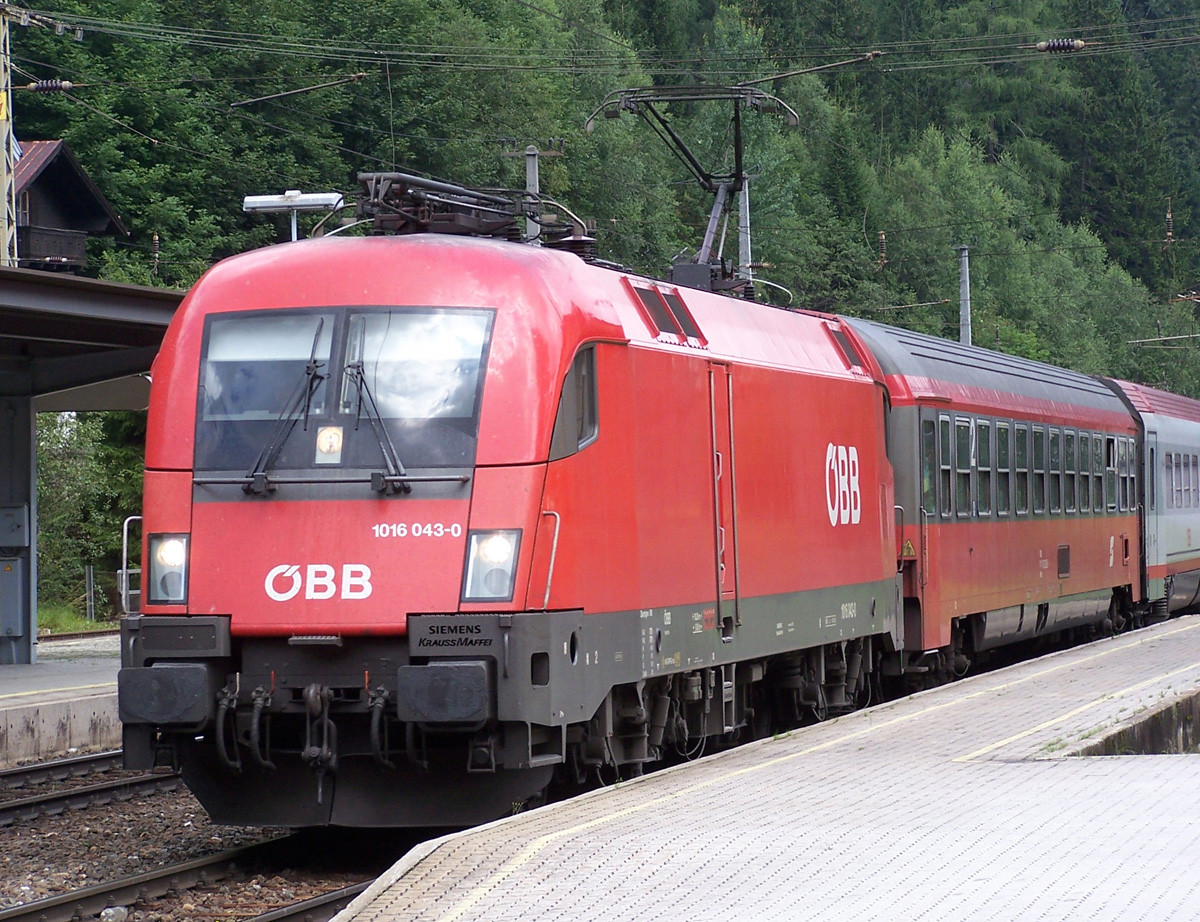 1016 Taurus - Badgastein